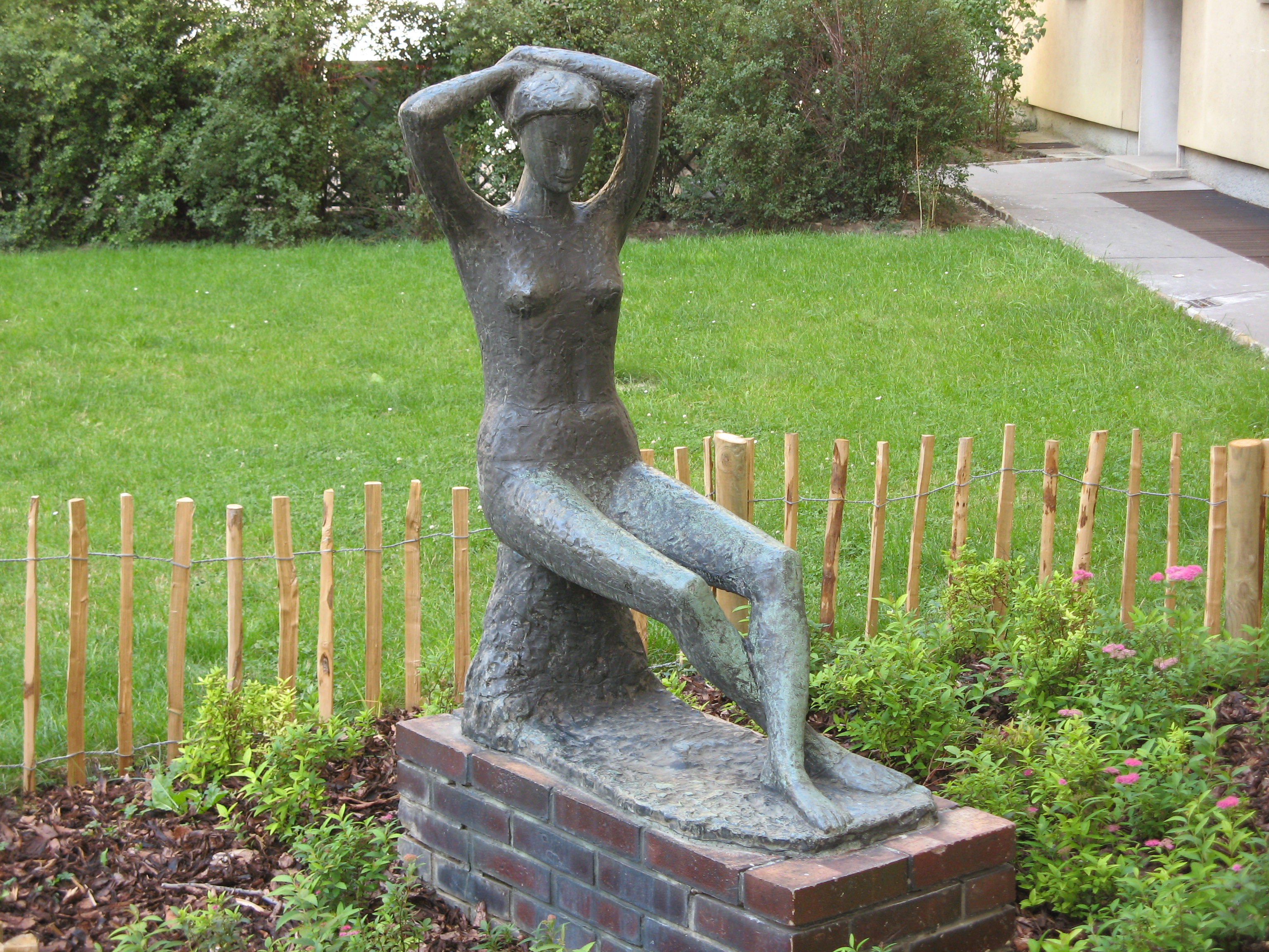 Sitzendes Mädchen (1955) von Rudolf Schwaiger, August-Fürst-Hof, Meidlinger Hauptstraße 8-10, Wien-Meidling